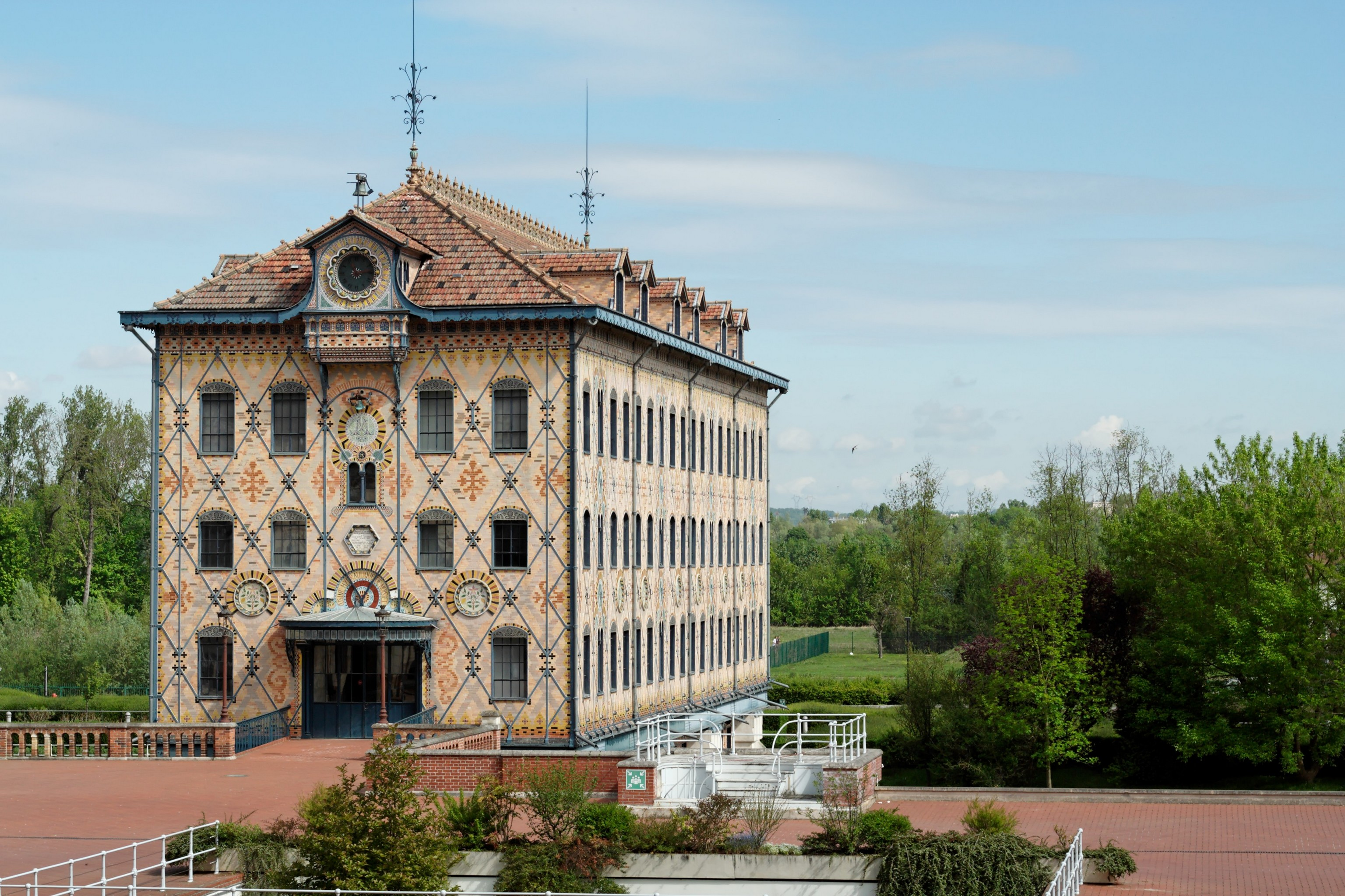 Unsine des chocolats Menier à Noisiel.